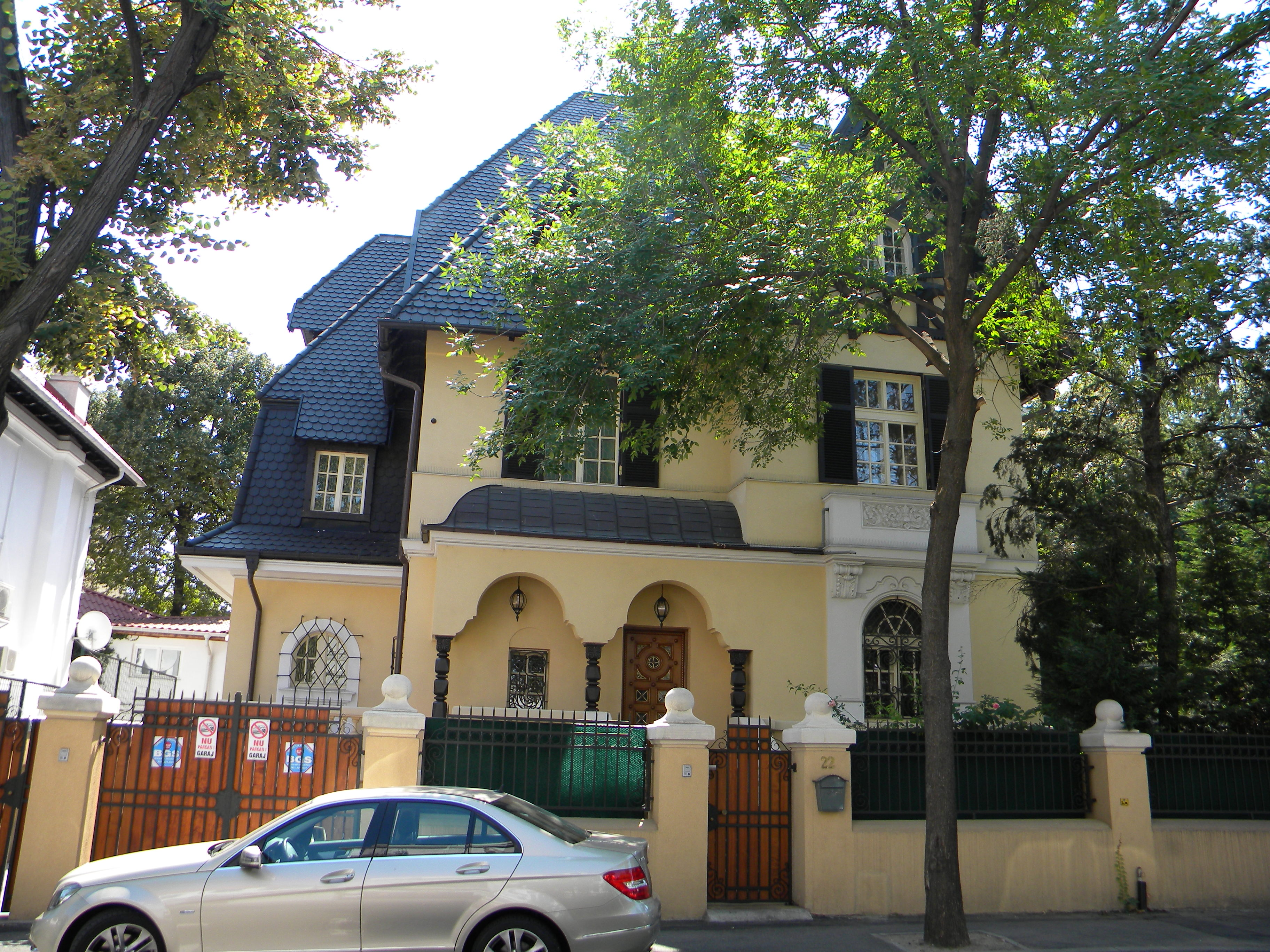 Vila pe Strada Sofia nr. 22, Bucuresti sect. 1